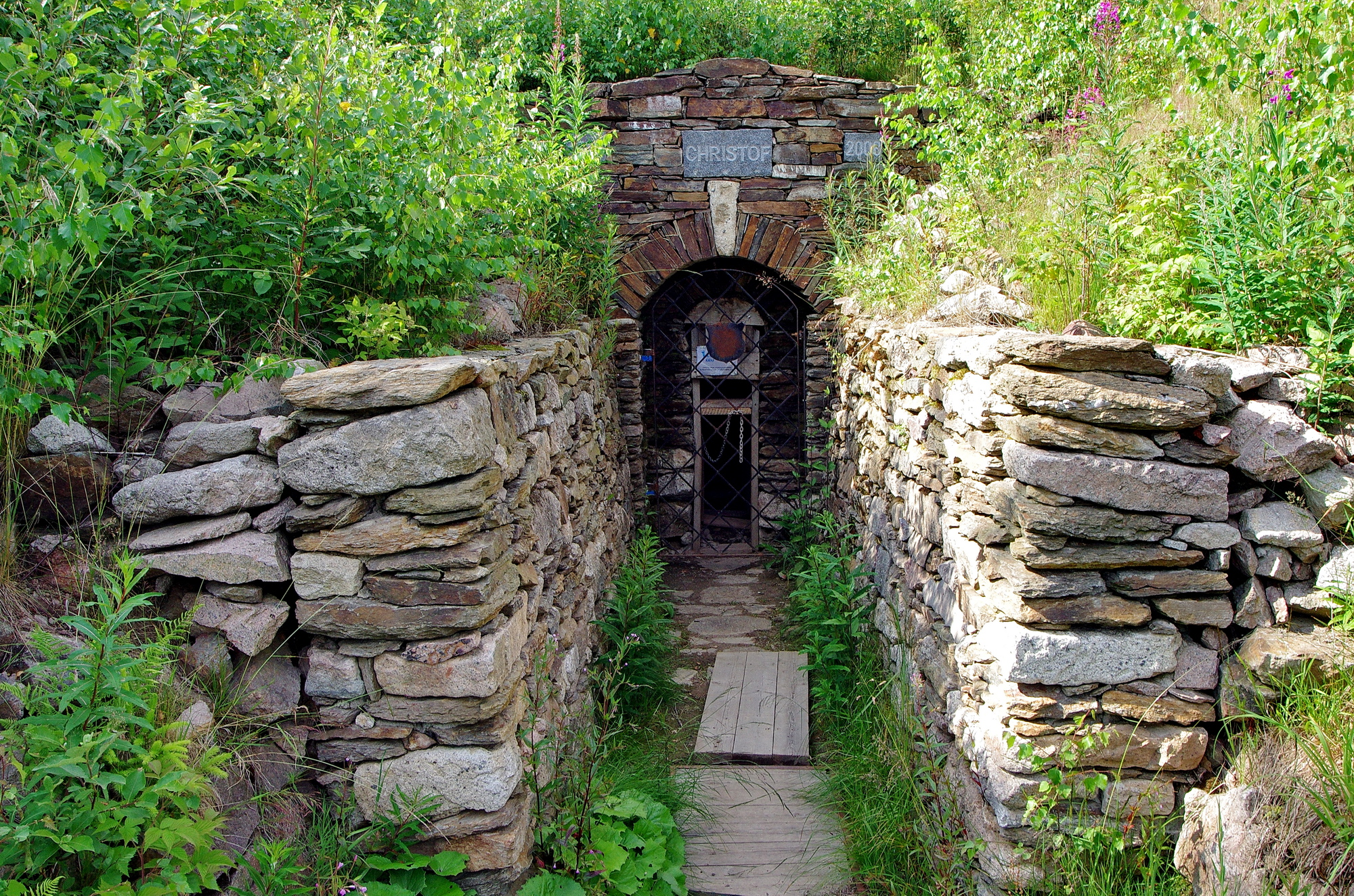 Hřebečná - portál štoly Kryštof dolu Mauritius, část obce Abertamy, Krušné hory, okres Karlovy Vary